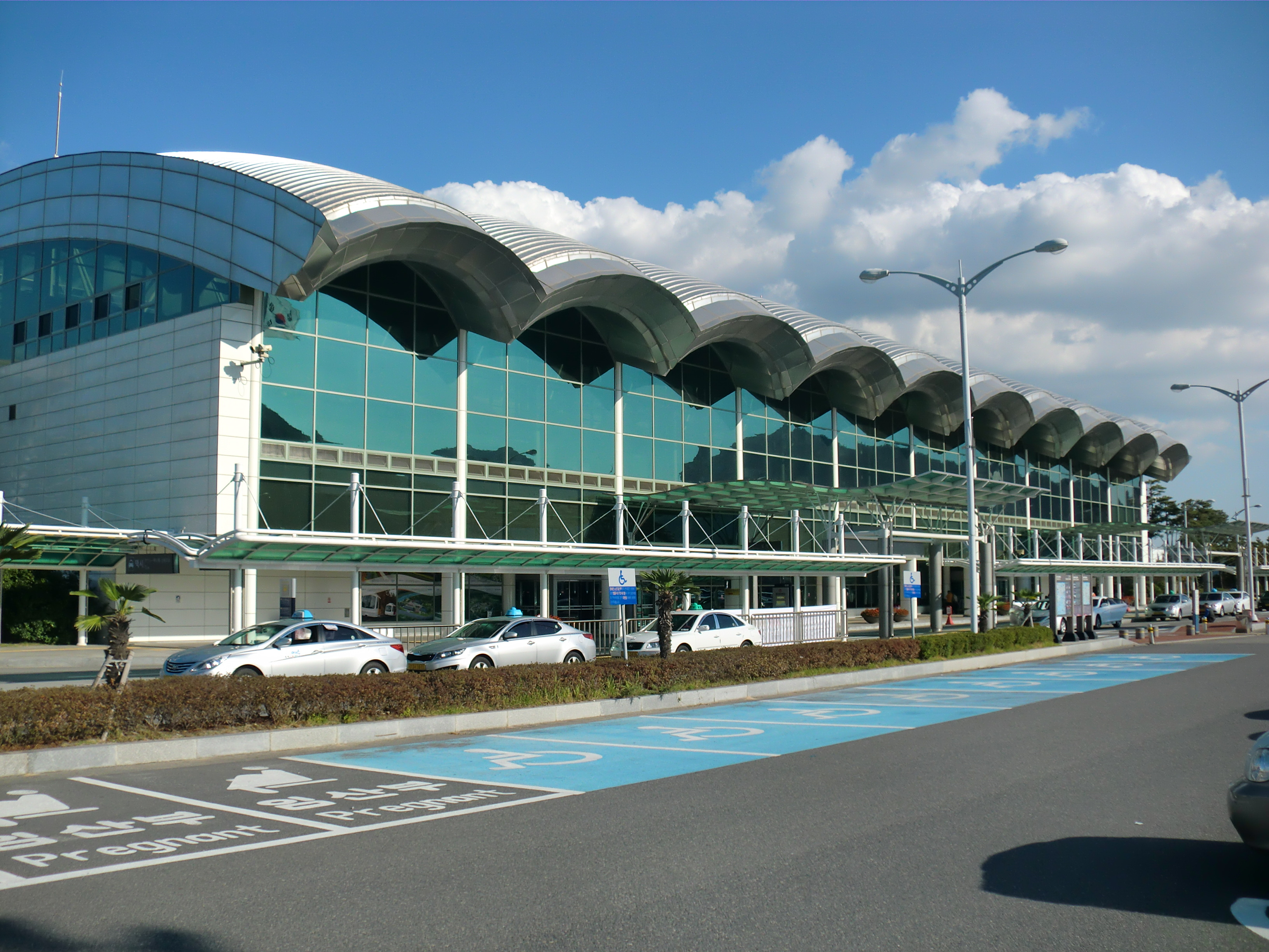 전라남도 여수에 있는 여수공항